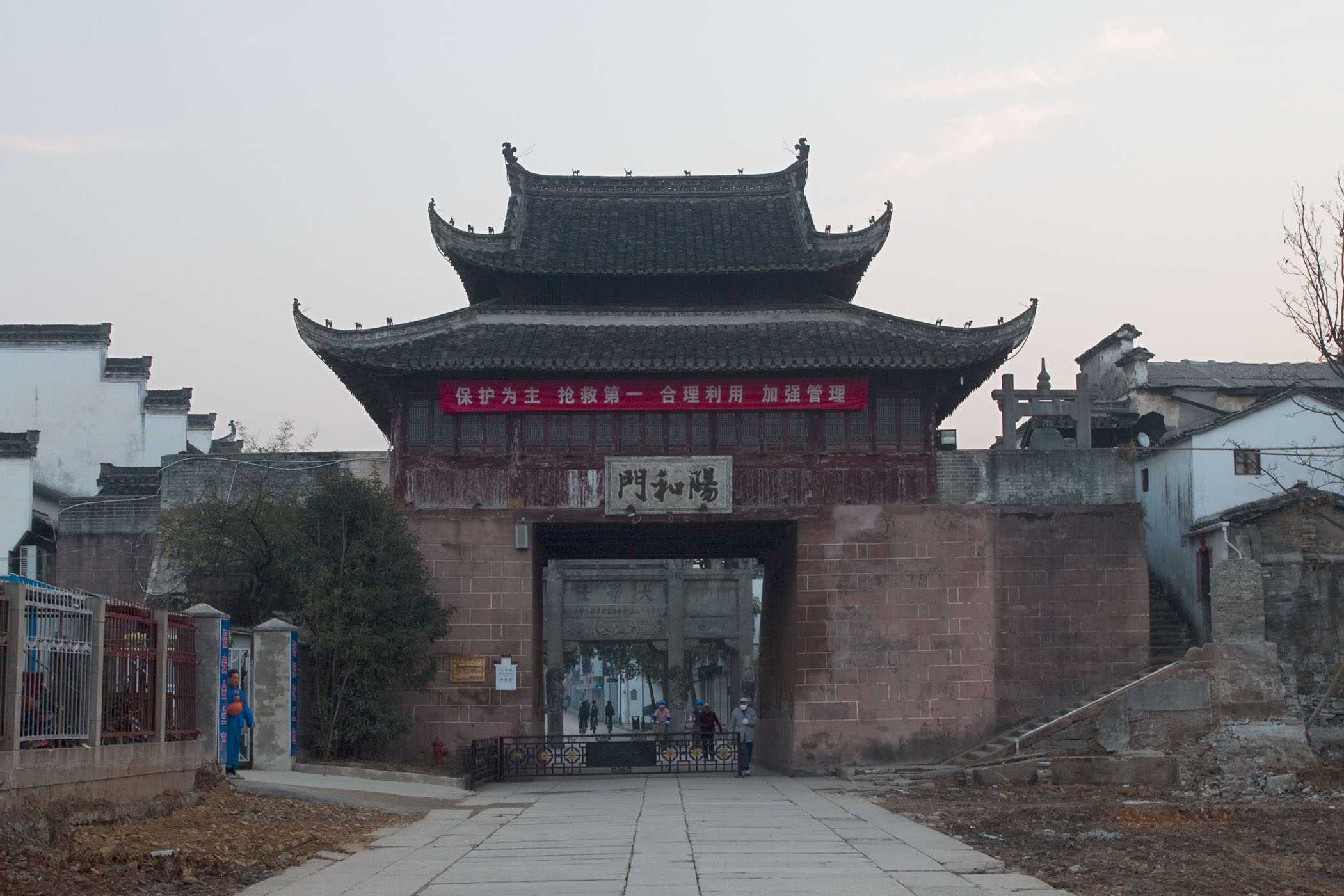 东谯楼，安徽省文物保护单位，位于安徽省歙县。